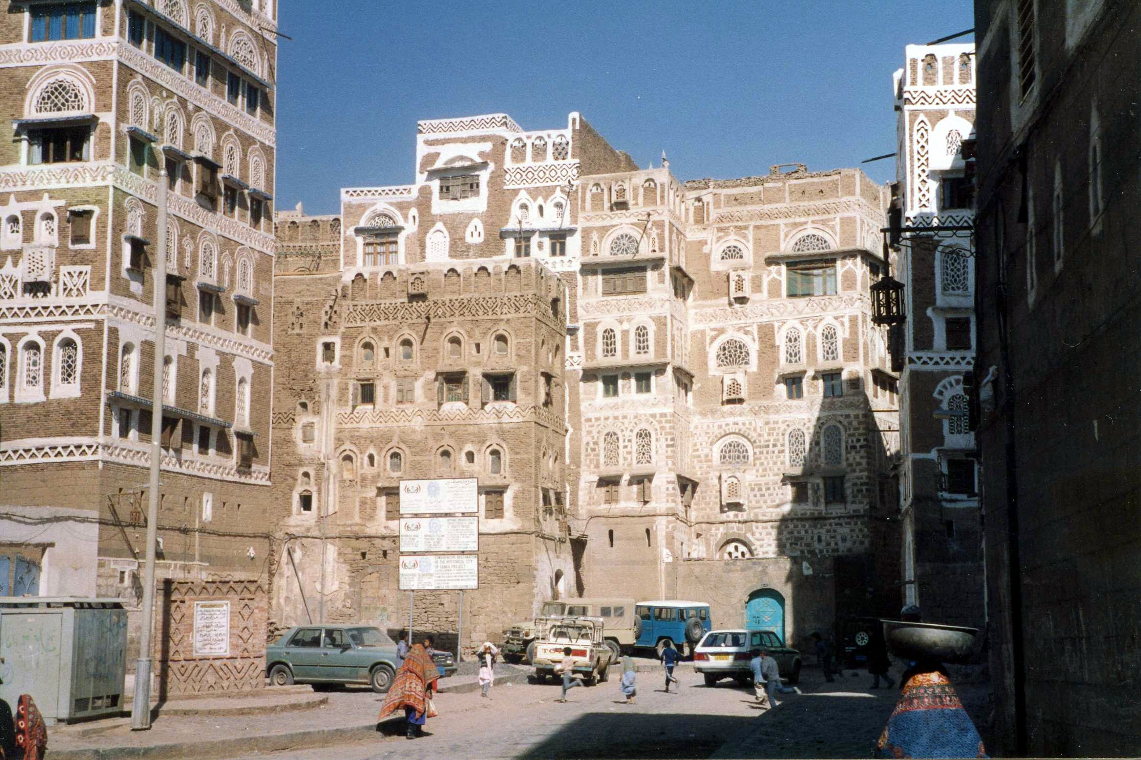 Sana'a